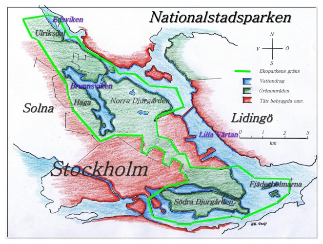 Übersichtkarte des Nationalstadtparks "Ökopark"